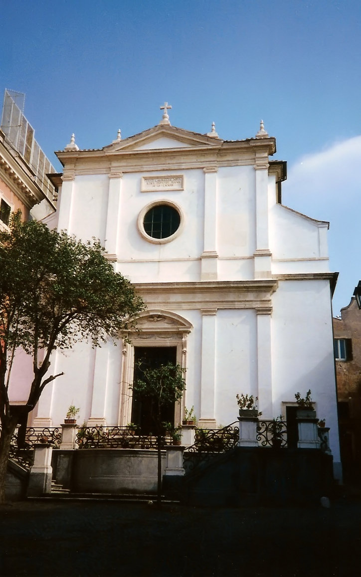 Chiesa di San Lorenzo in Panisperna, Roma